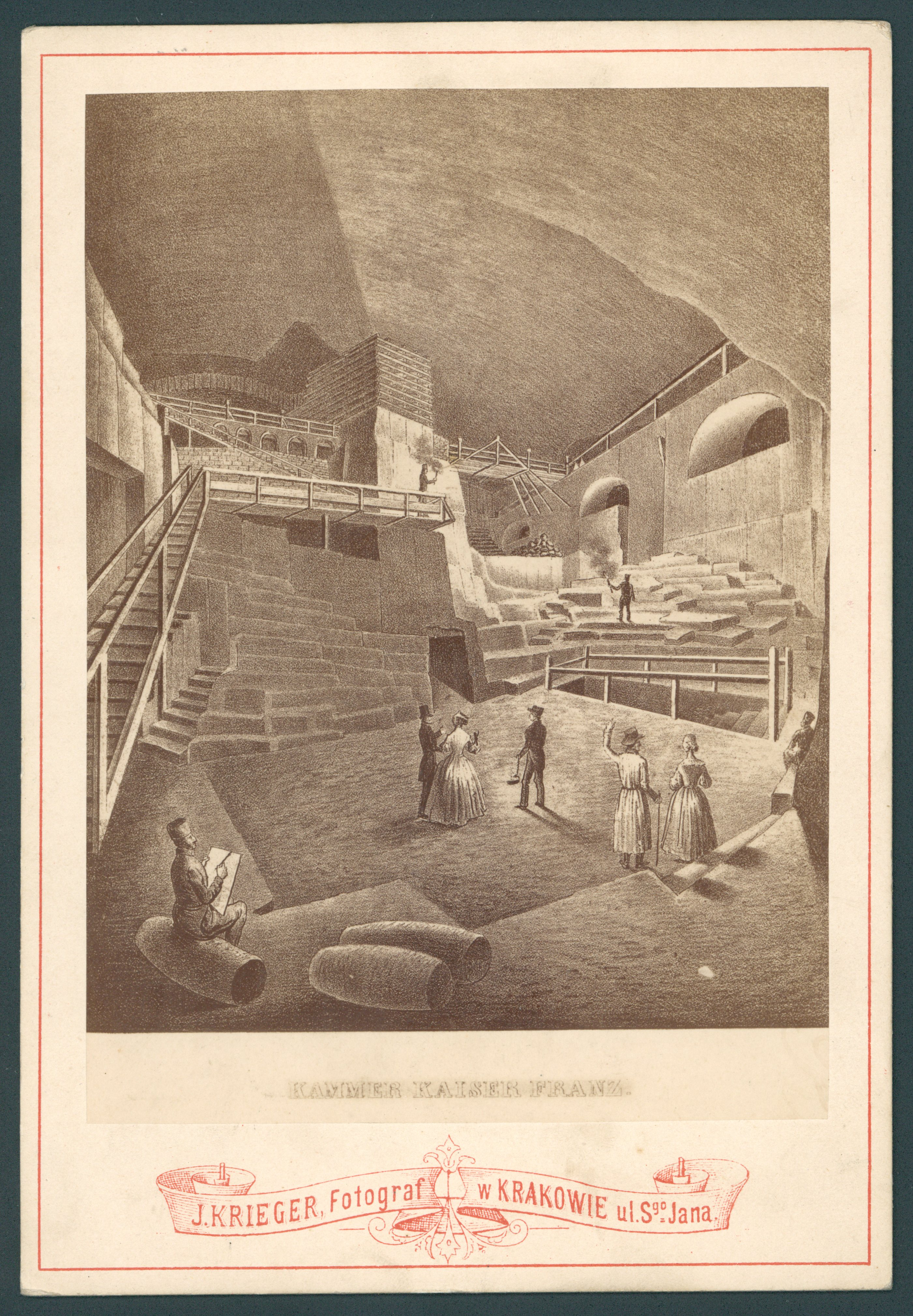 fotografia ryciny, [1886]